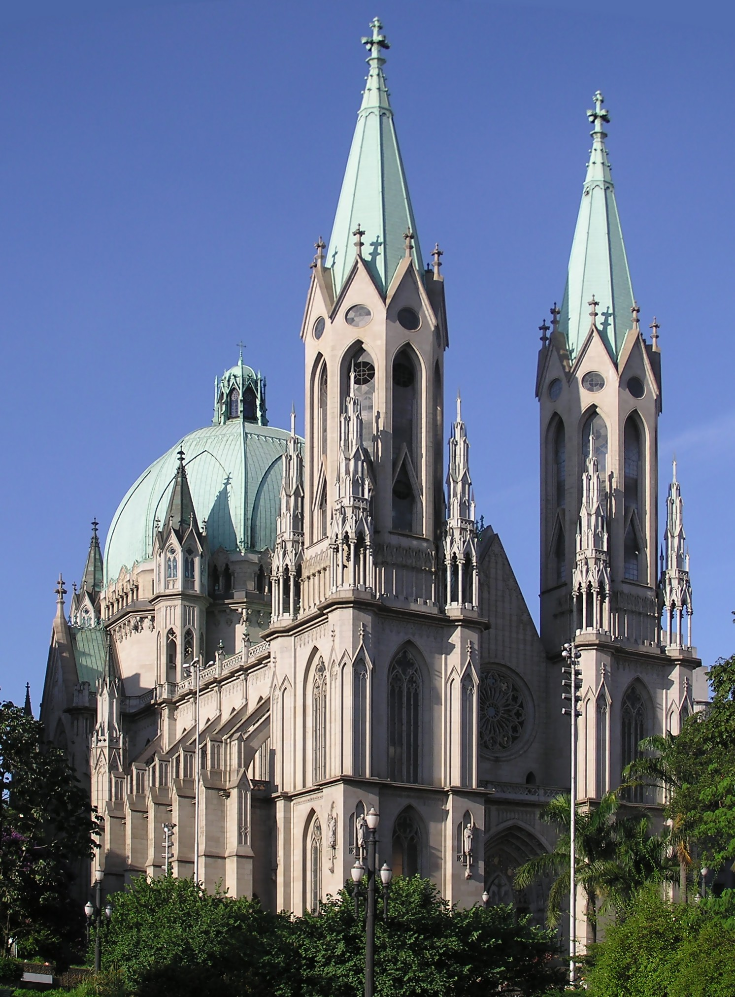 Catedral Metropolitana de São Paulo